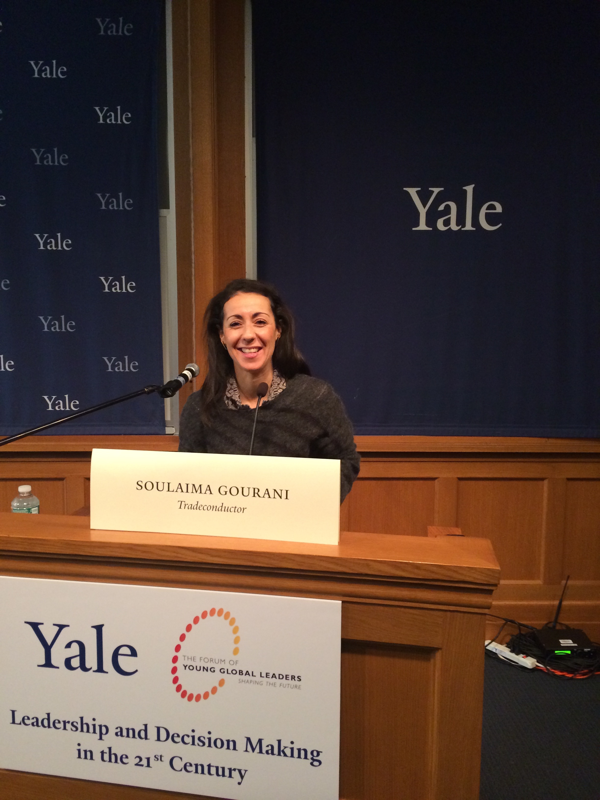 Soulaima Gourani at Yale University